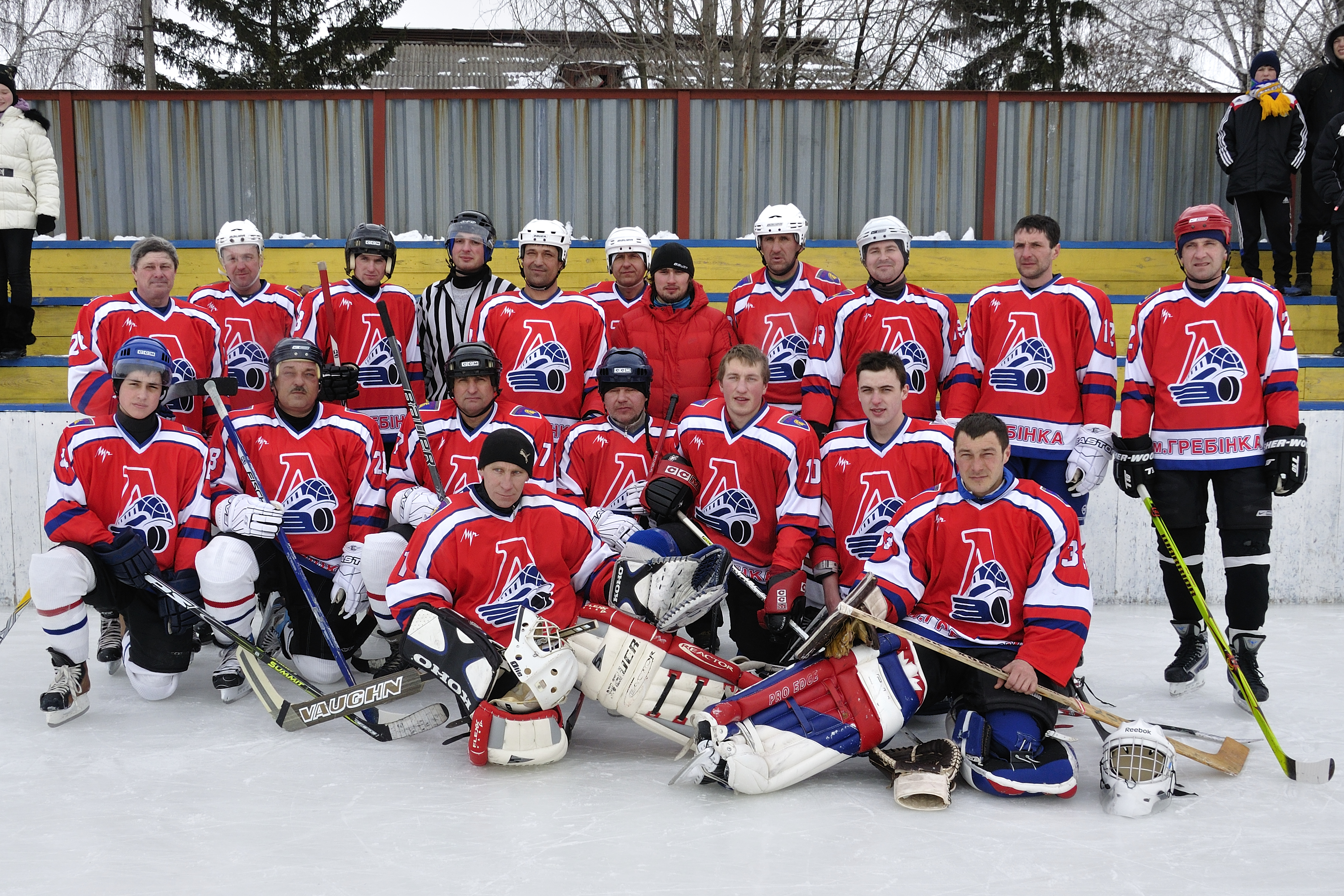 ХК "Локомотив" , м. Гребінка, Полтавська область, Україна